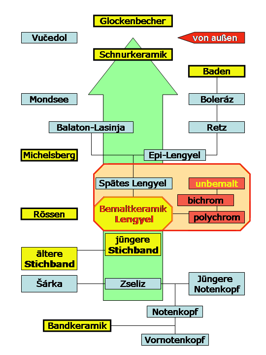 Lengyel